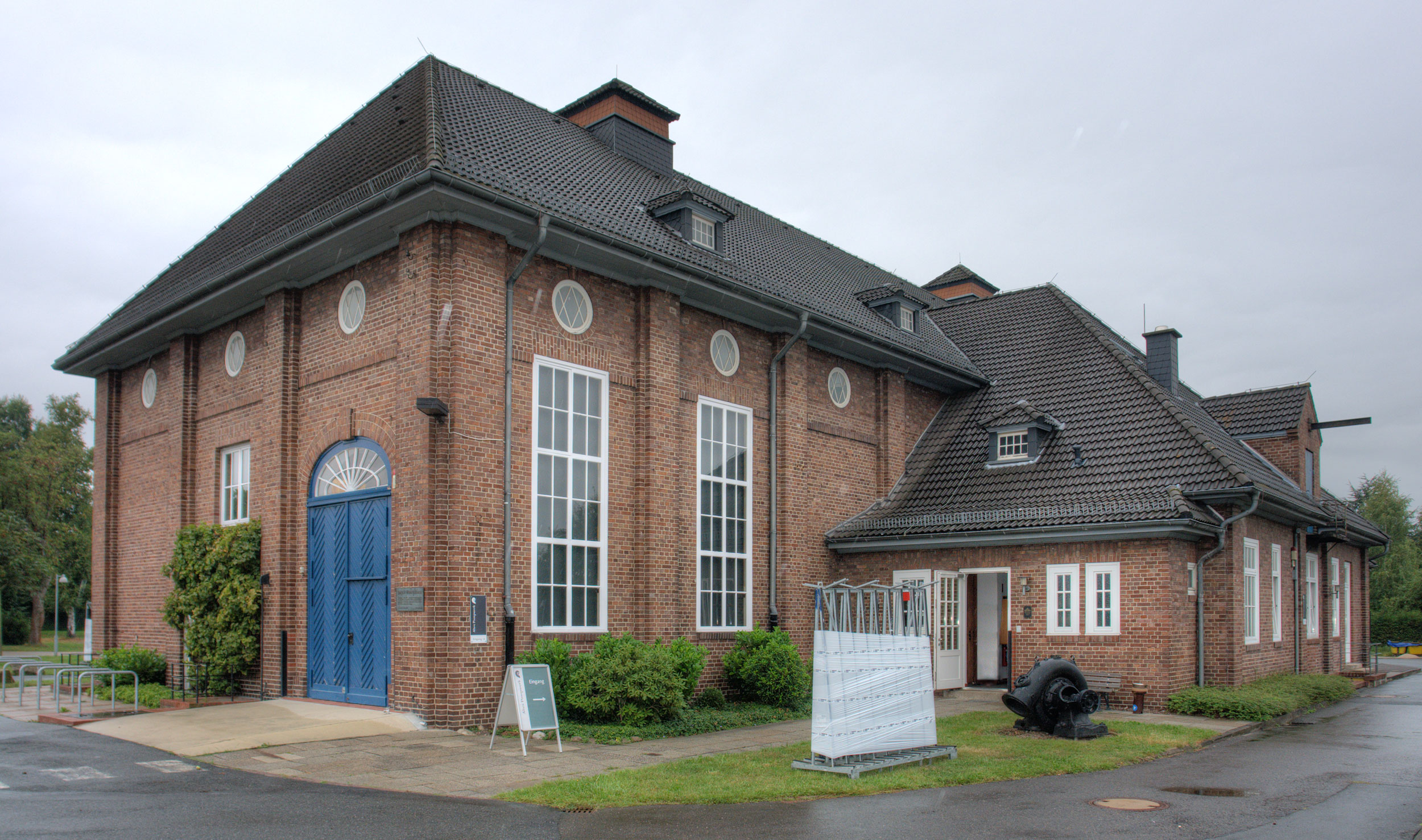 Hauptpumpwerk I, Maschinenhaus in Bremen, Bayernstraße 129Das abgebildete Objekt ist ein geschütztes Kulturdenkmal in der Freien Hansestadt Bremen, mit der Nr. 0423 beim Landesamt für Denkmalpflege registriert.